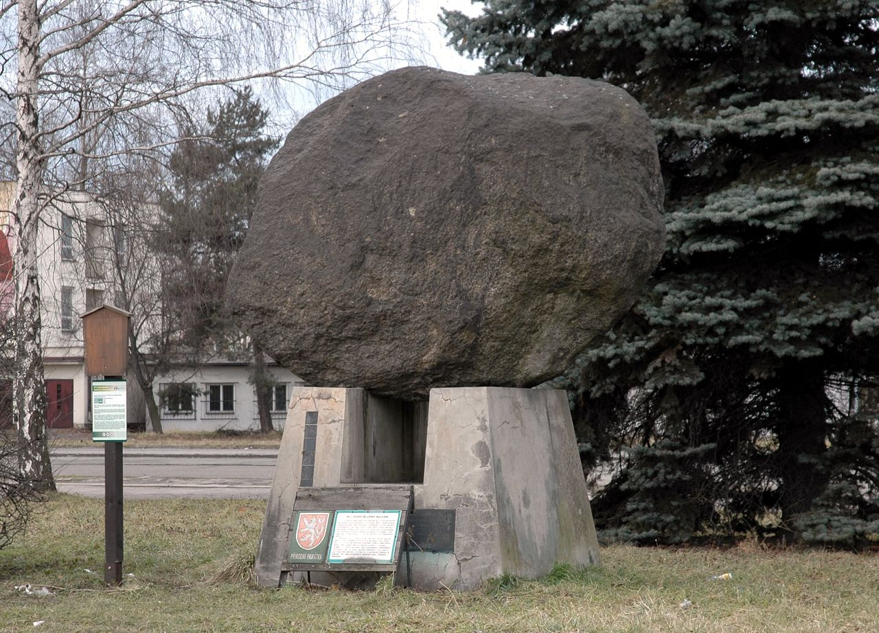 Kunčický bludný balvan, Ostrava-Kunčice